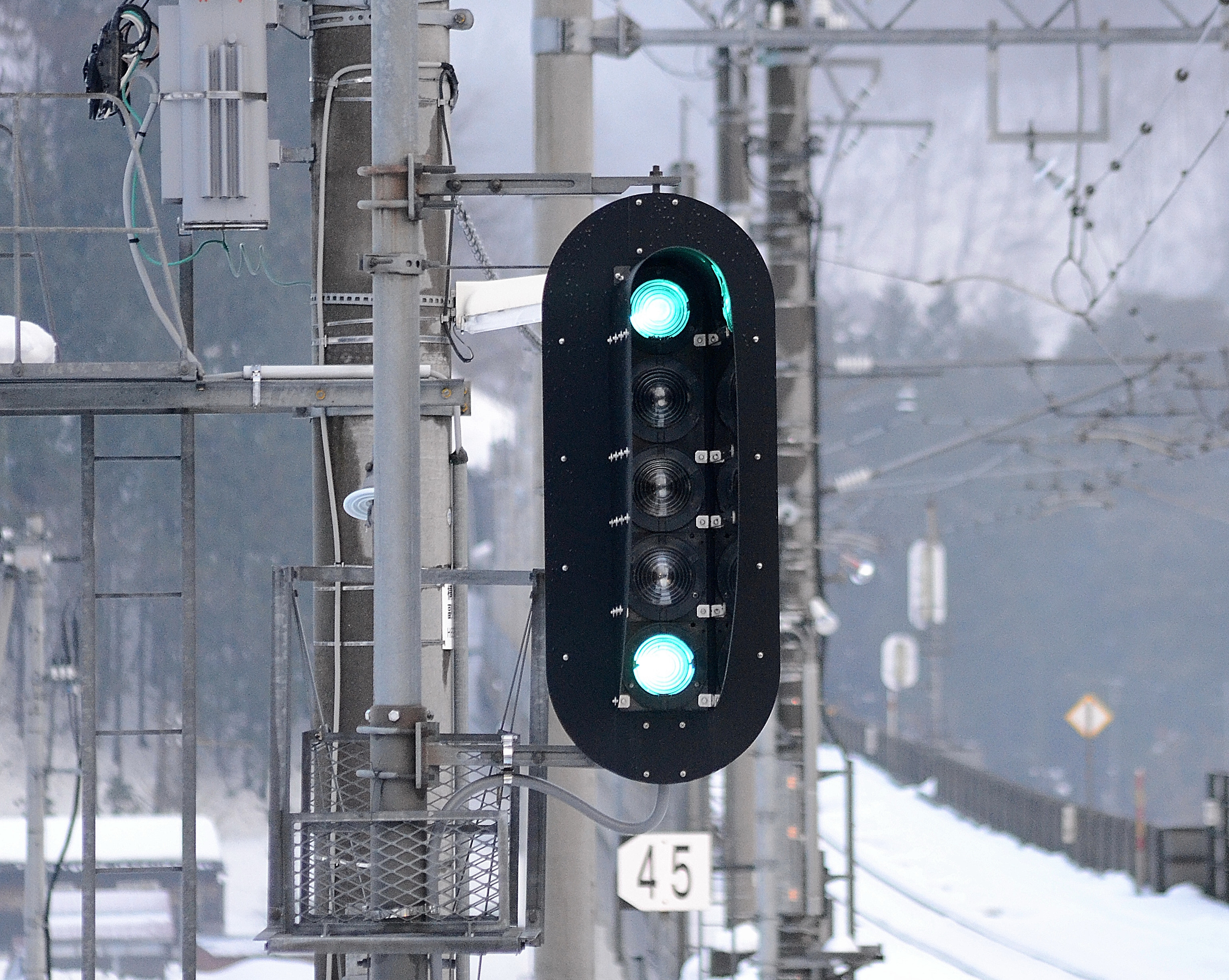 北越急行ほくほく線、虫川大杉駅の出発信号機のGG信号（ホームから撮影）